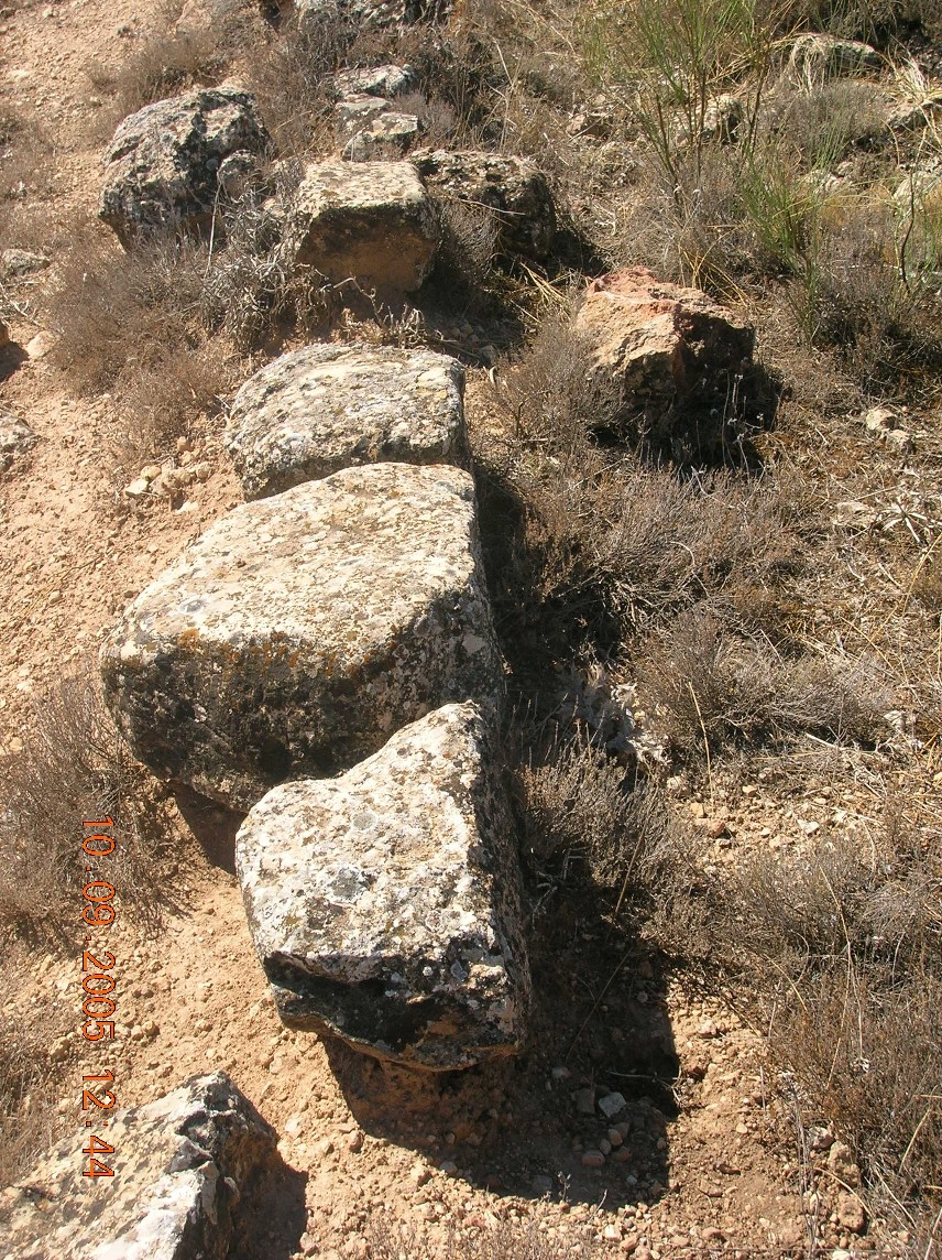 Detalle de una posible rodera romana, en una via terrena del Paraje de La Pasadilla.